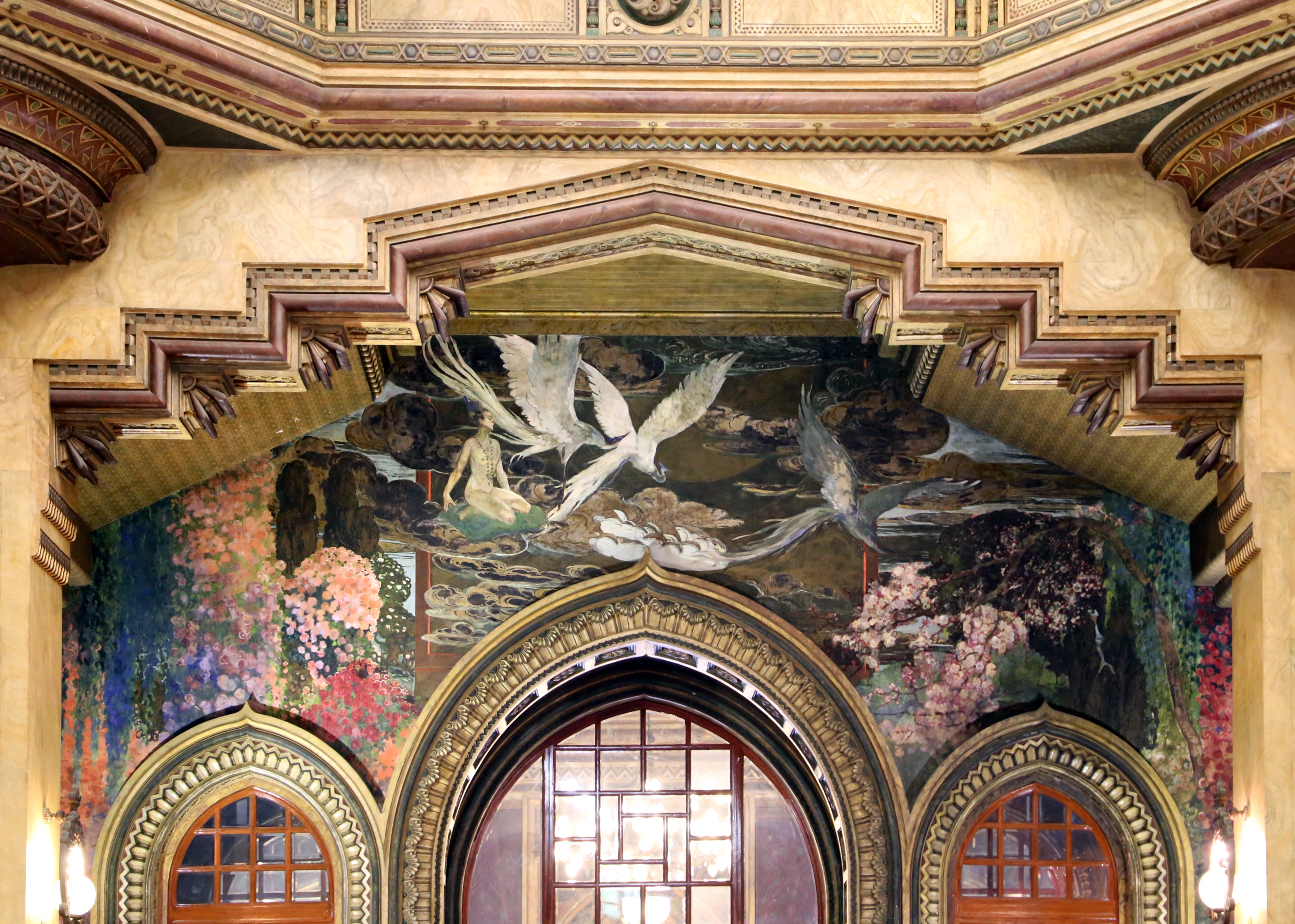 Palazzo dei Congressi (Salsomaggiore Terme) This is a photo of a monument which is part of cultural heritage of Italy.